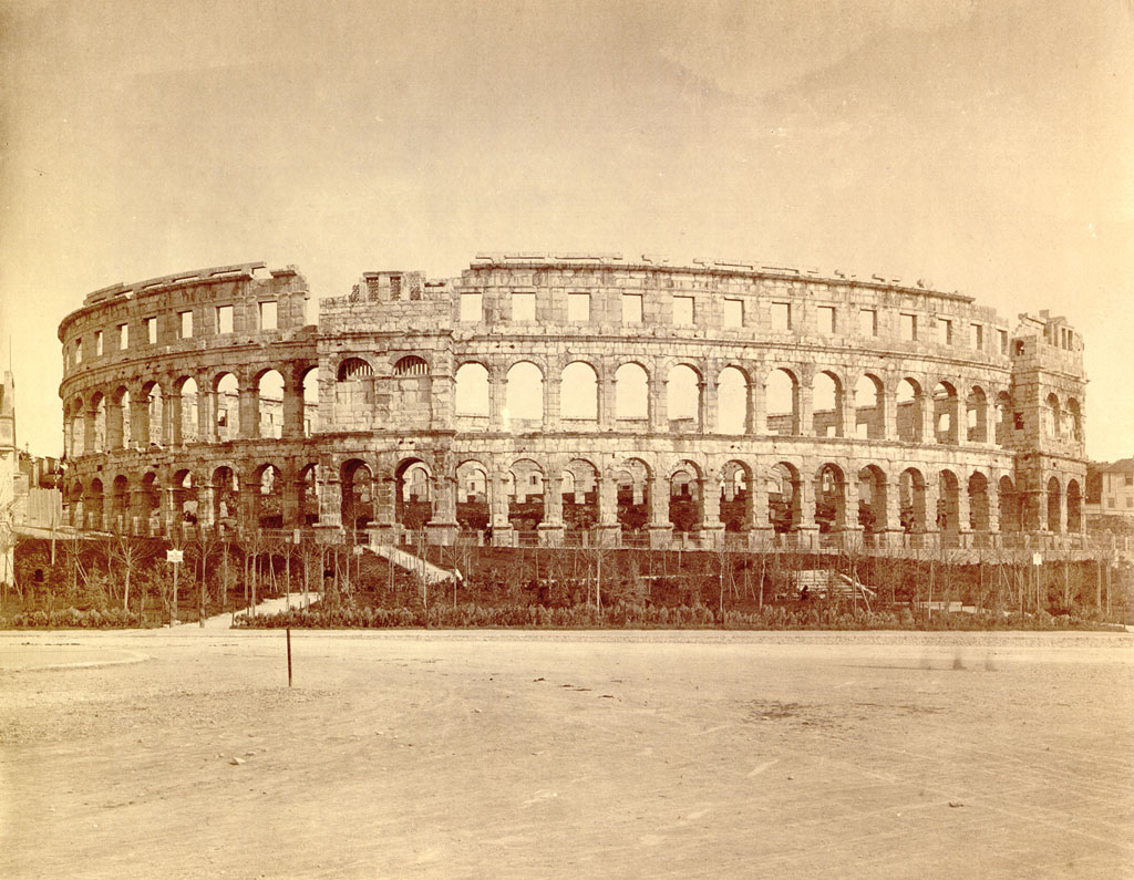 arena, austro hungarian empire